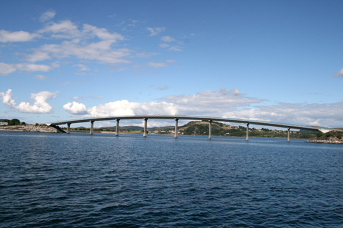 Åmøybrua